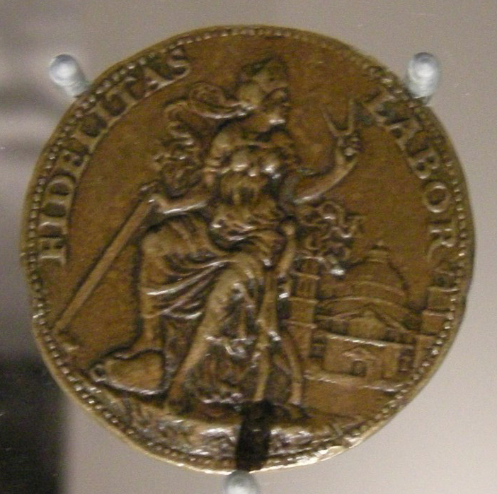 Caradosso, medaglia di donato bramante, 1505-06 circa